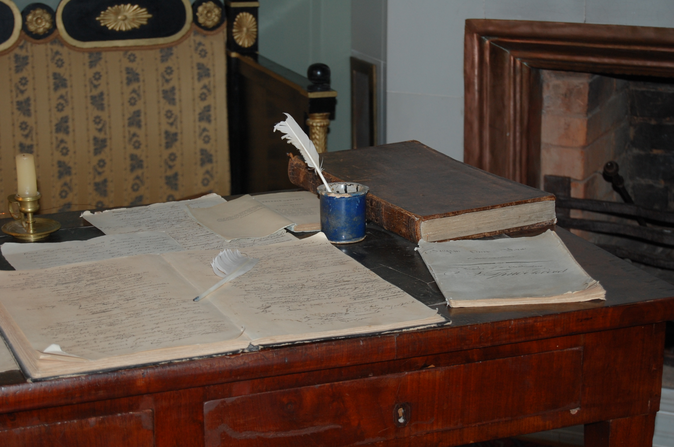 Главный дом (Псковская область, Опочка, село Михайловское)